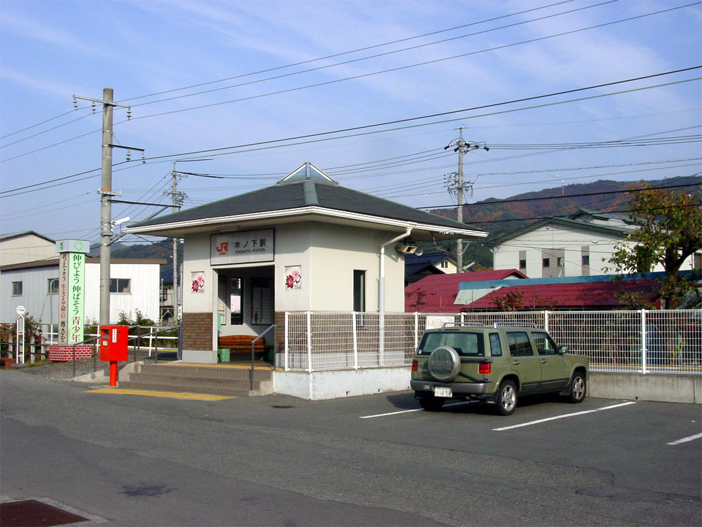 飯田線木ノ下駅駅舎（長野県上伊那郡箕輪町） 投稿者が撮影（2005年11月撮影）